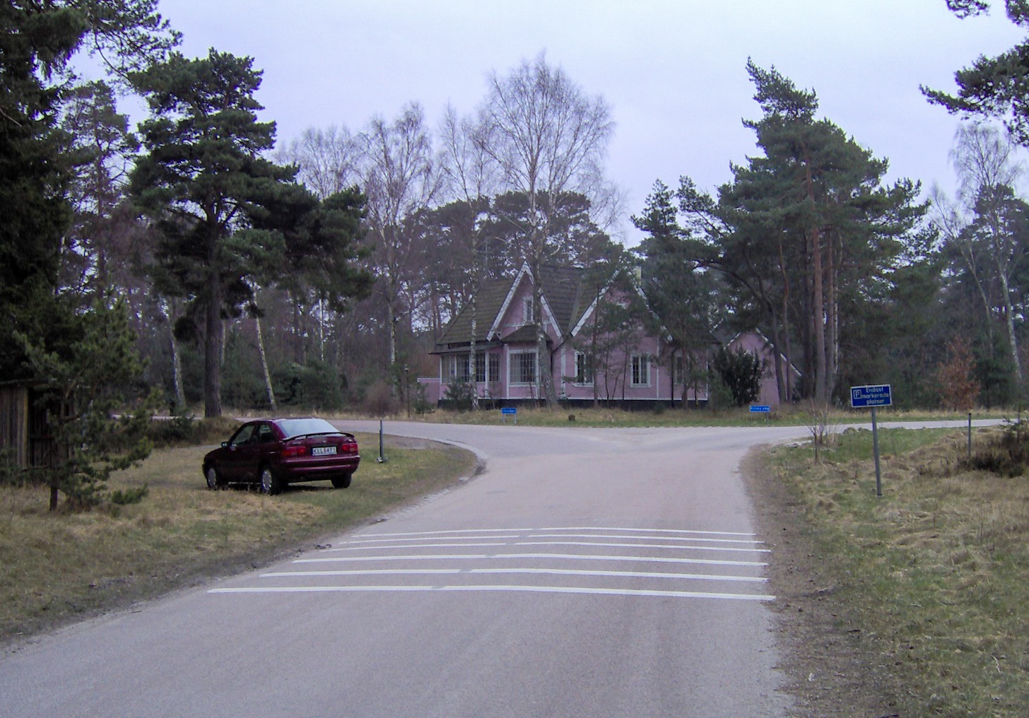 Stjärnplan, Ljunghusen, Sweden, 2005 Source: taken by user march 23rd 2005